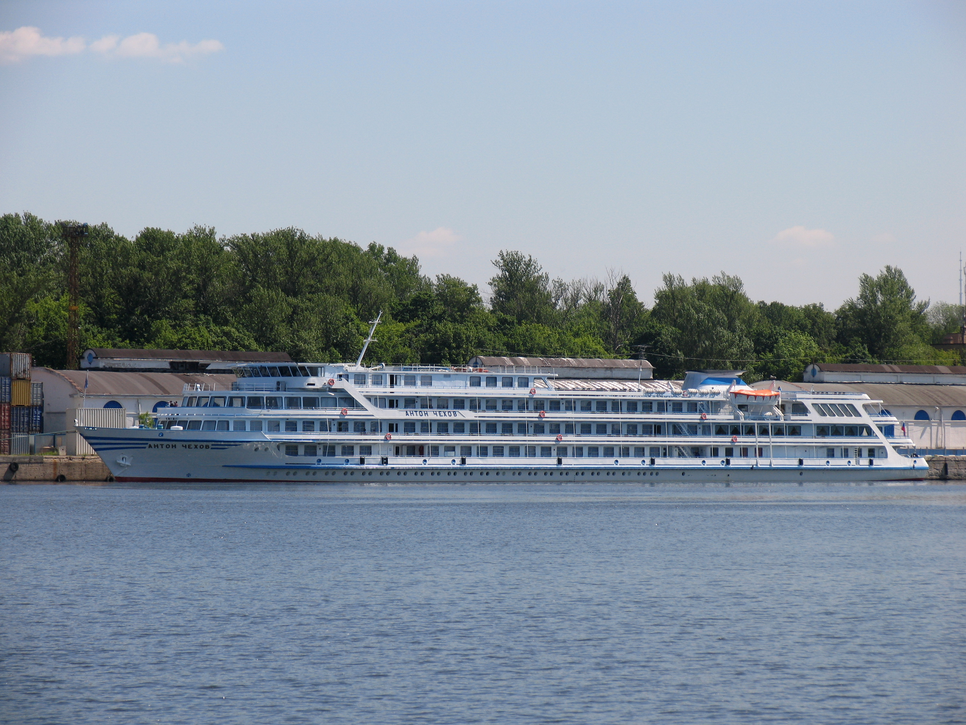 Речное круизное судно "Антон Чехов" в Северном речном порту.